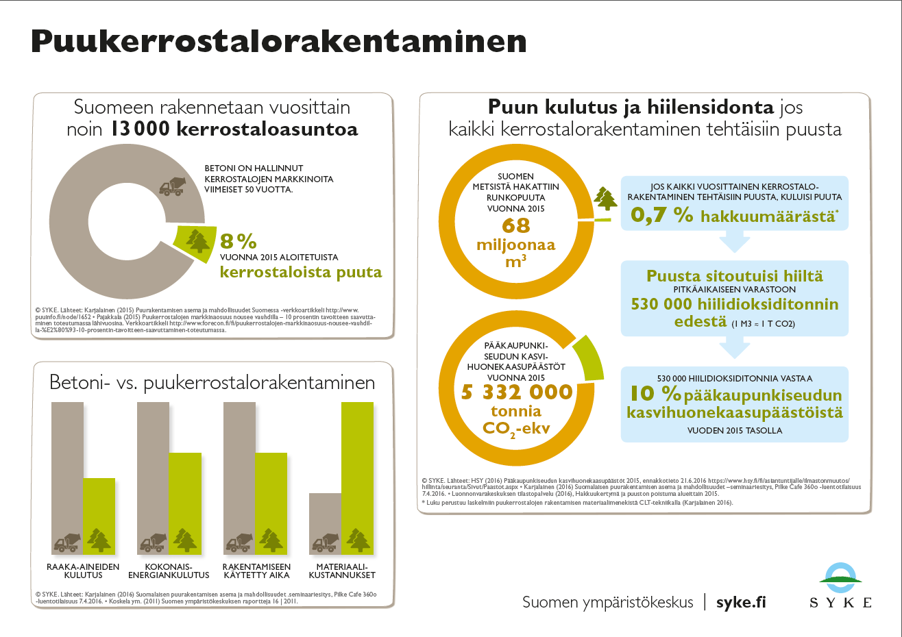 Luontopohjaisia ratkaisuja yhteiskunnallisiin haasteisiin -hankkeessa SYKEssä syksyllä 2016 tuotettua infografiikkaa puun käytöstä luontopohjaisena ratkaisuna kerrostalorakentamisessa.